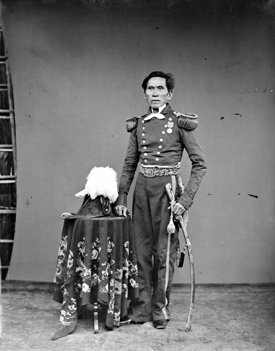 Negatief. Datulong, oud-majoor van Sonder Manado